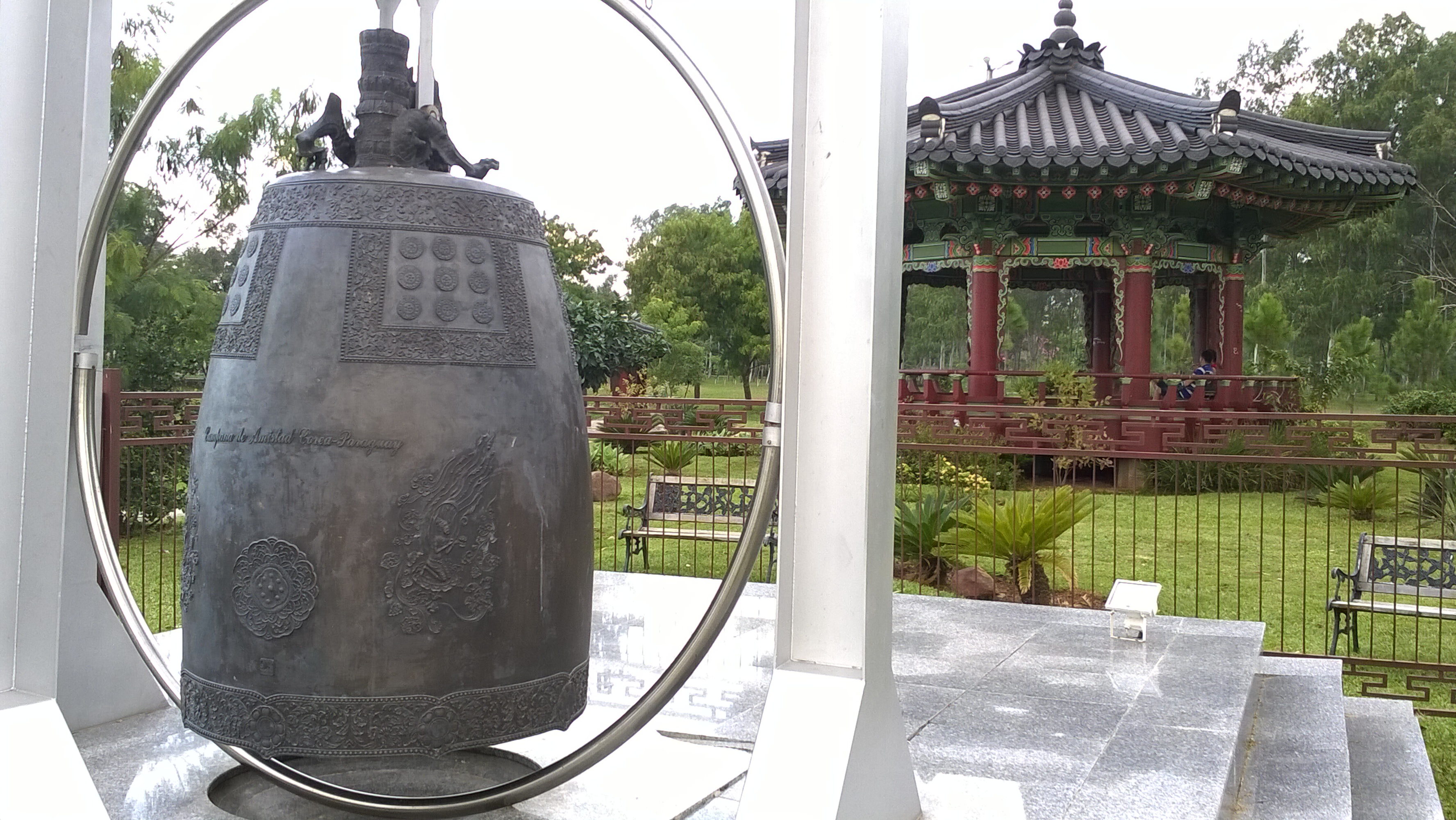 Campana alusiva Cooperación Paraguay Korea 2